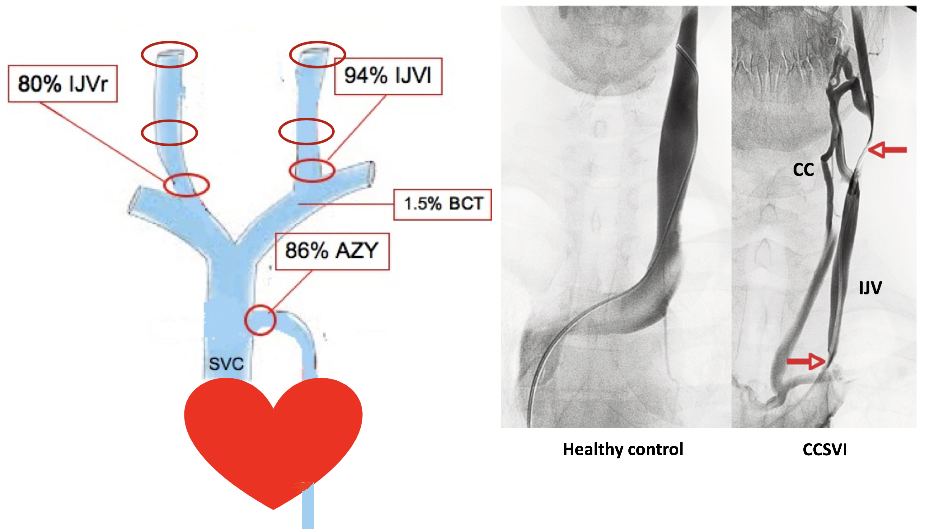 Destra. I siti cerchiati rappresentano le localizzazioni più frequenti delle steno ostruzioni venose extracraniche, spesso fra loro associate in corso di CCSVI. Legenda: IJVr = vena giugulare interna destra; IJVl = vena giugulare interna sinistra; BCT = tronco brachio cefalico; AZY = vena azygos; SVC = vena cava superiore. Sinistra. Due flebografie con catetere a confronto. Quella a sinistra riproduce una vene giugulare interna normale (Healthy control). Quella a destra una vena giugulare interna affetta da CCSVI (CCSVI). Le frecce indicano le zone di stenosi. CC indica i circoli collaterali che si sono sviluppati per vicariare le stenosi.